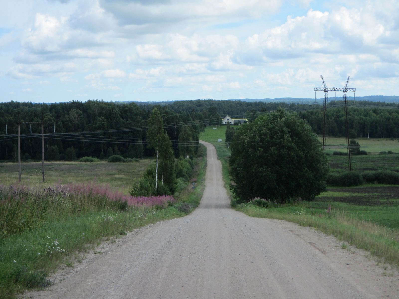 Tee mäest alla Killinge lähedal